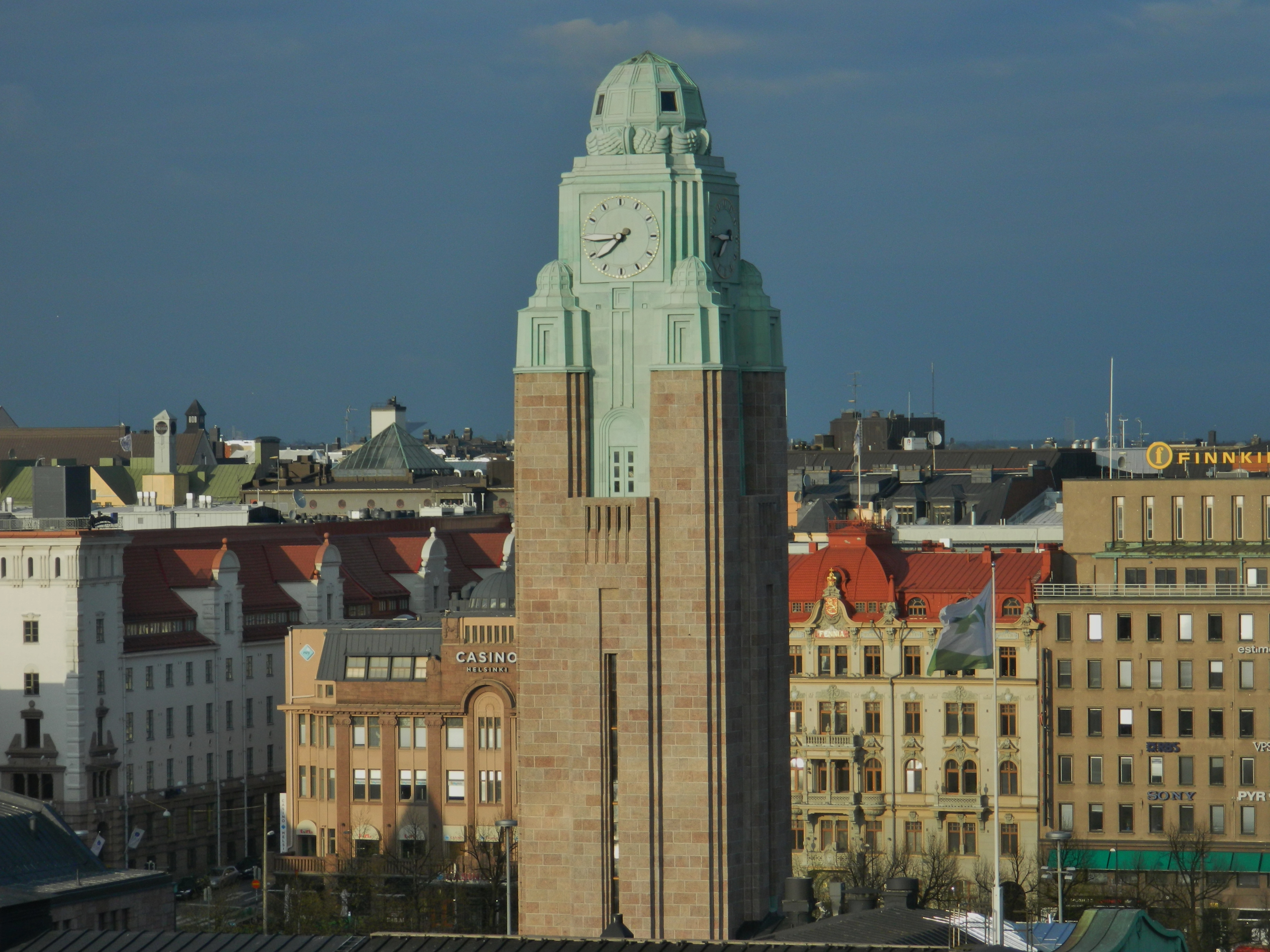 Helsingin rautatieasema Sokos Hotellista kuvattuna